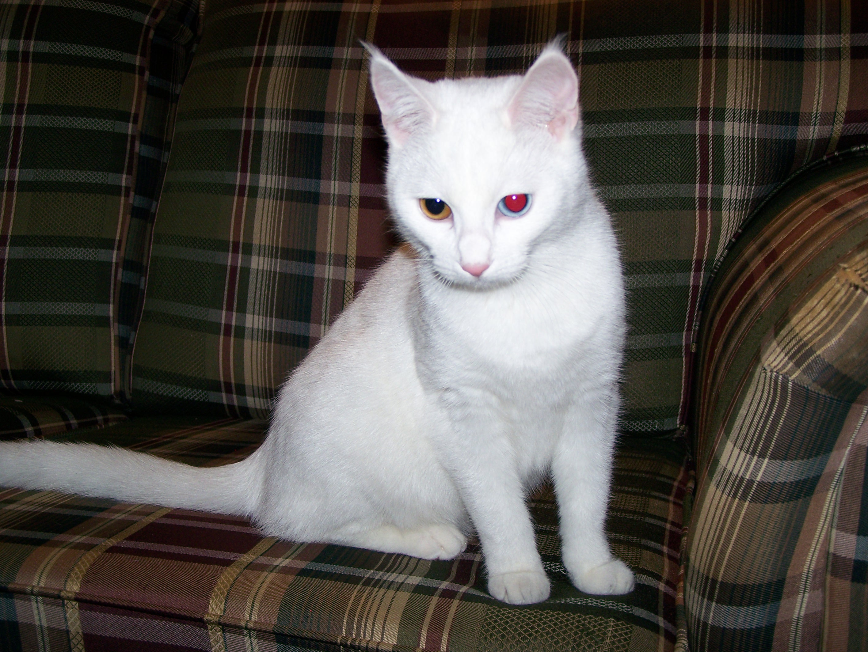 Dove kat bijela